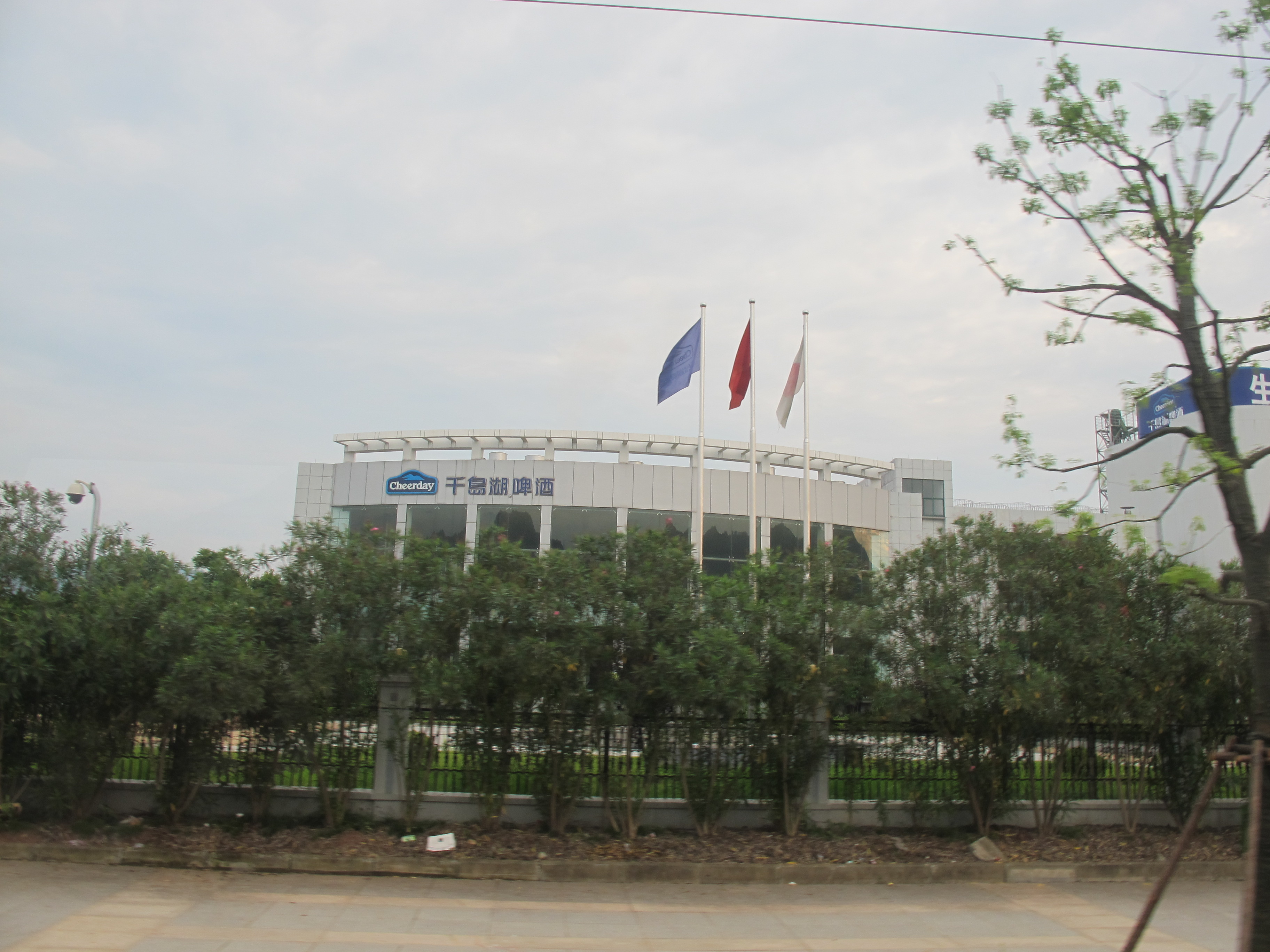 淳安啤酒厂